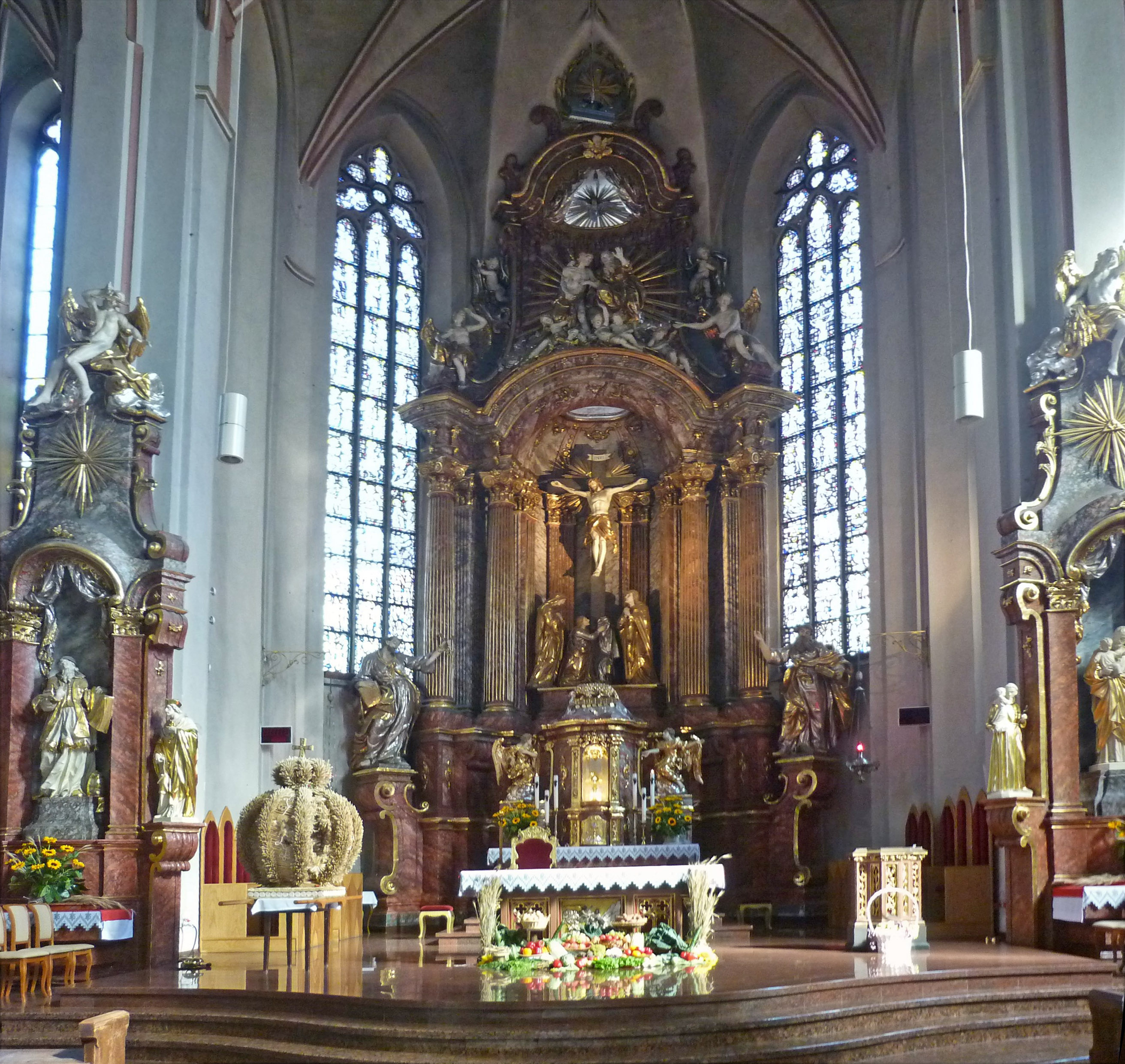 Kathedrale zum Heiligen Kreuz in Oppeln in Schlesien